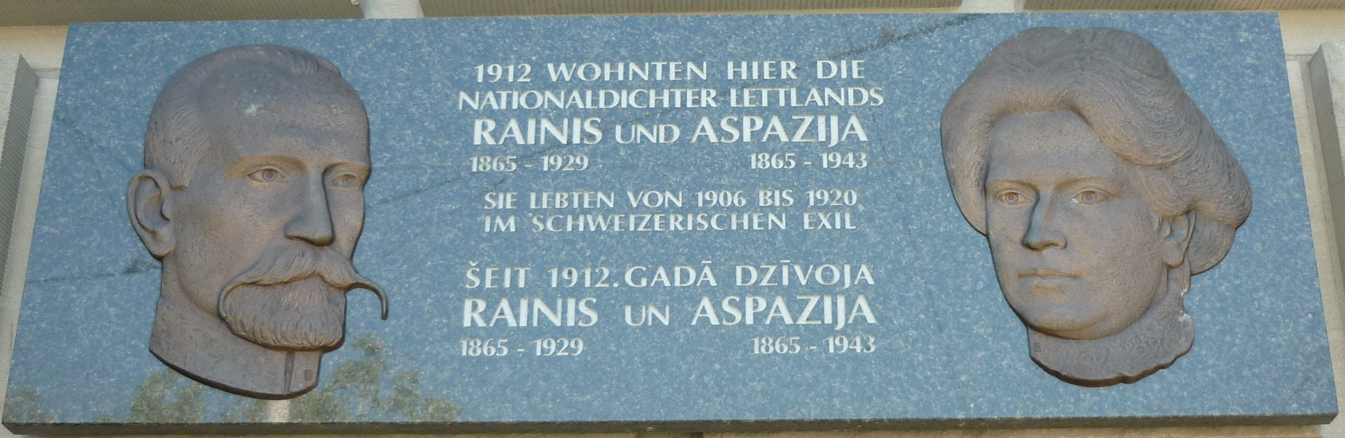 Gedenktafel Rainis und Aspazija, Usteristrasse 14, Zürich, Schweiz